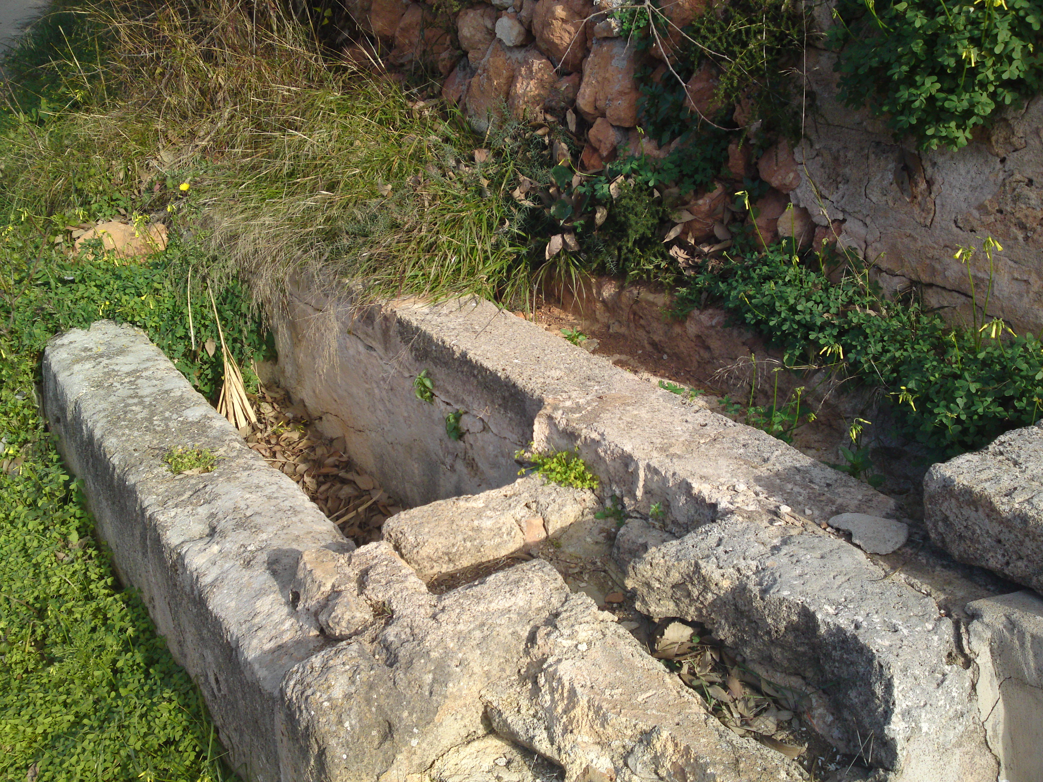 Pica de la canaleta que conduïa l'aigua des de la font de Son Reus fins a Llucmajor (Mallorca)